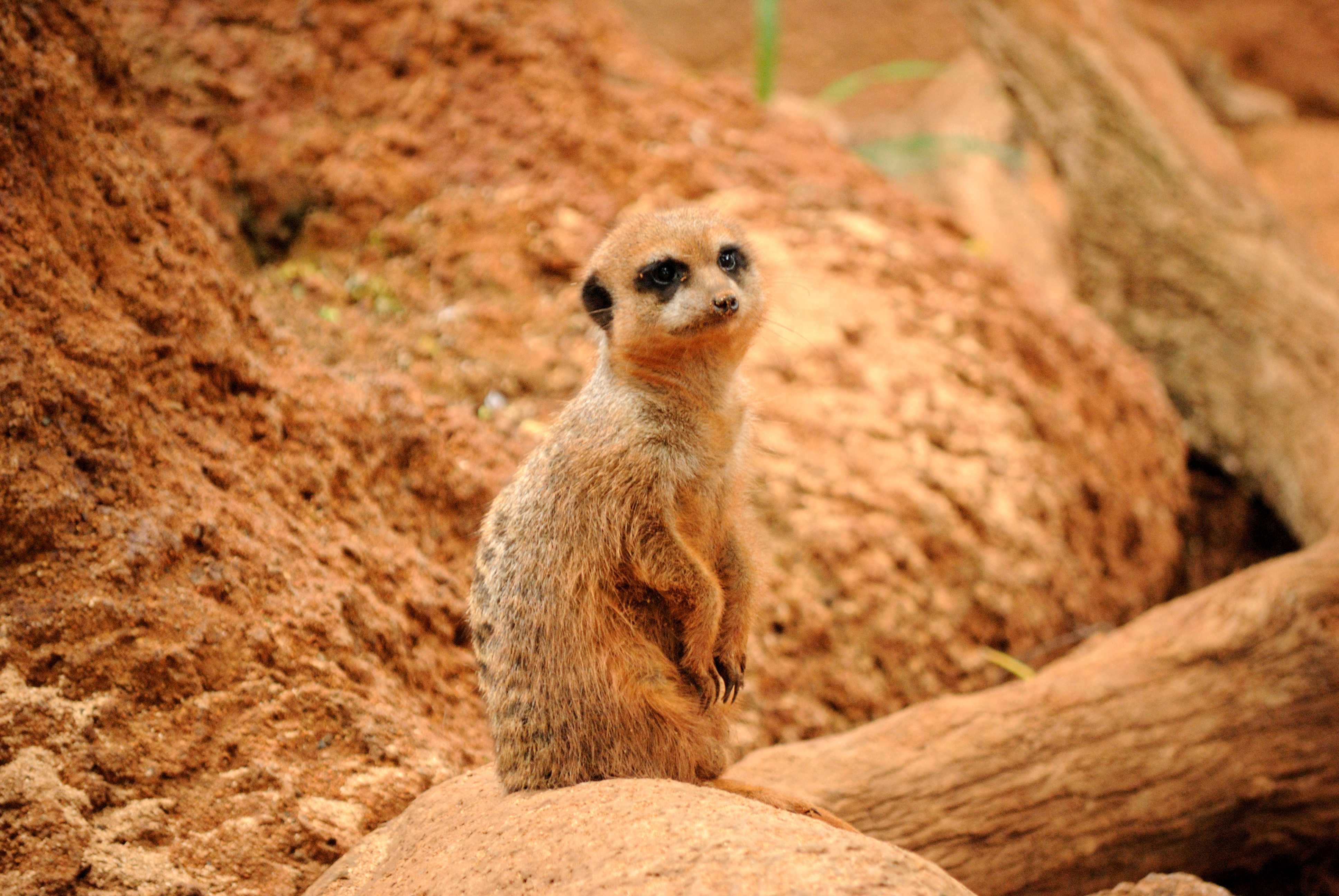 Meerkat